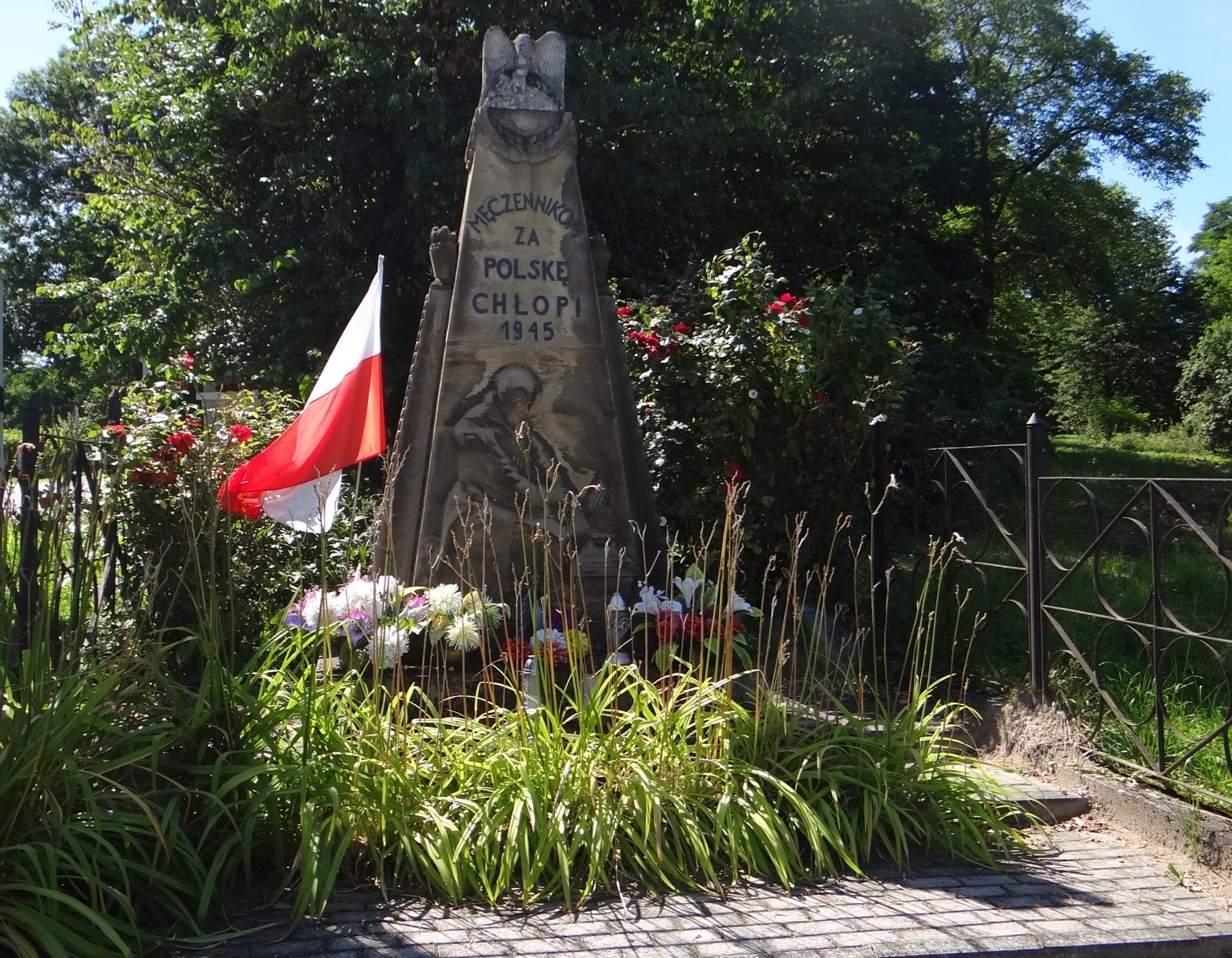 Żerosławice. Pomnik chłopów, męczenników za Polskę (1915 r.